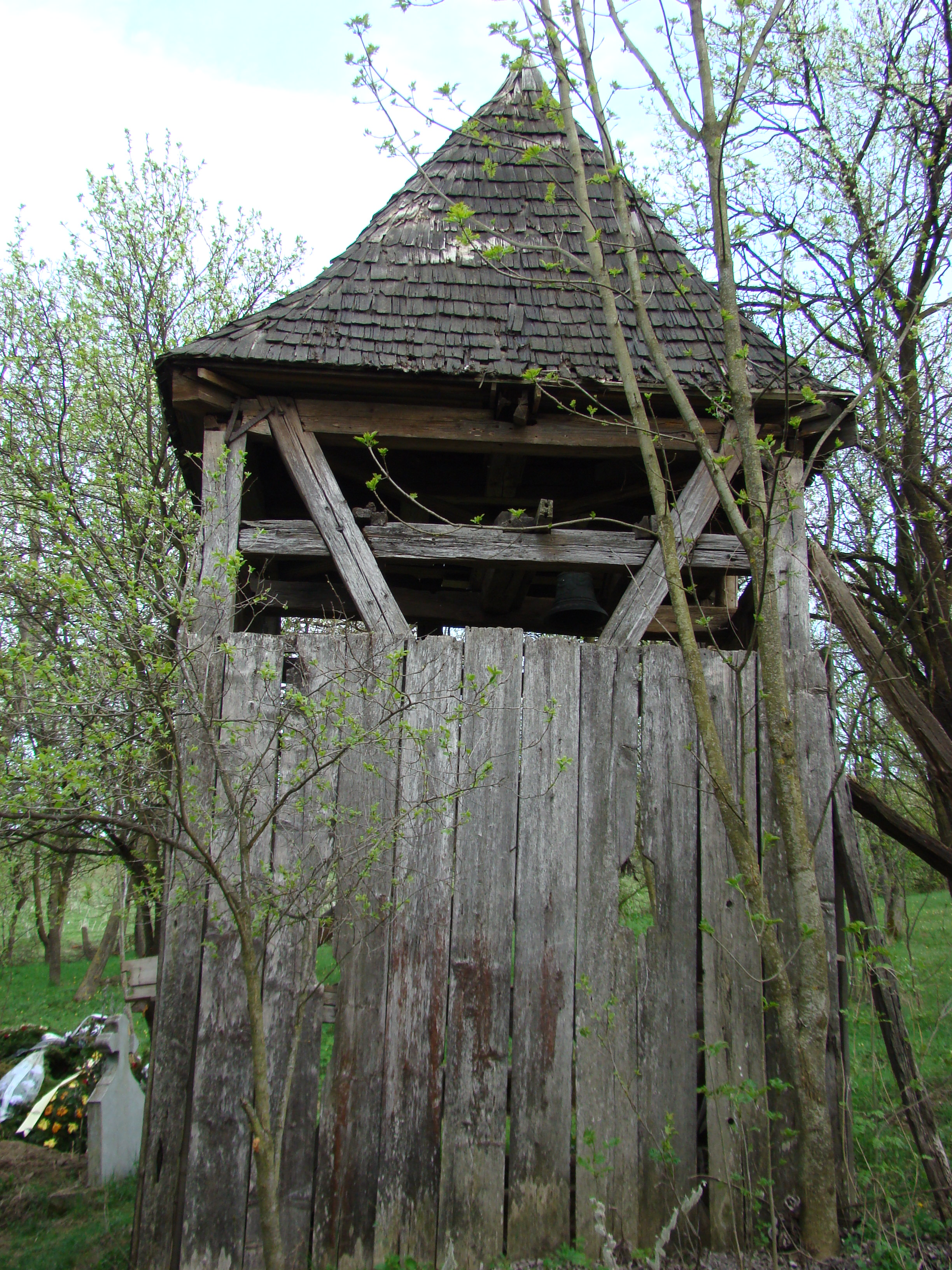 Biserica de lemn din Găbud, județul Alba.